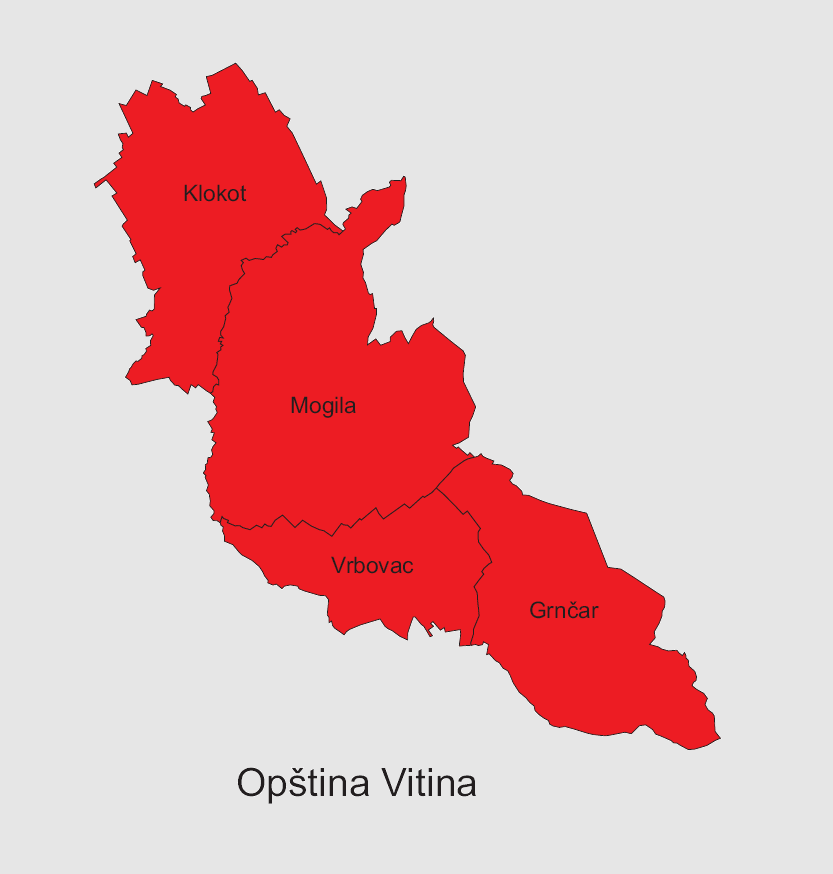 autor: Varjačić Vladimir, izvor: Zakon o administrativnim granicama opština, Skupština Kosova